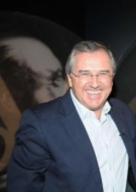 José Laurentino Gomes (Maringá, 17 de fevereiro de 1956) é um jornalista e escritor brasileiro.